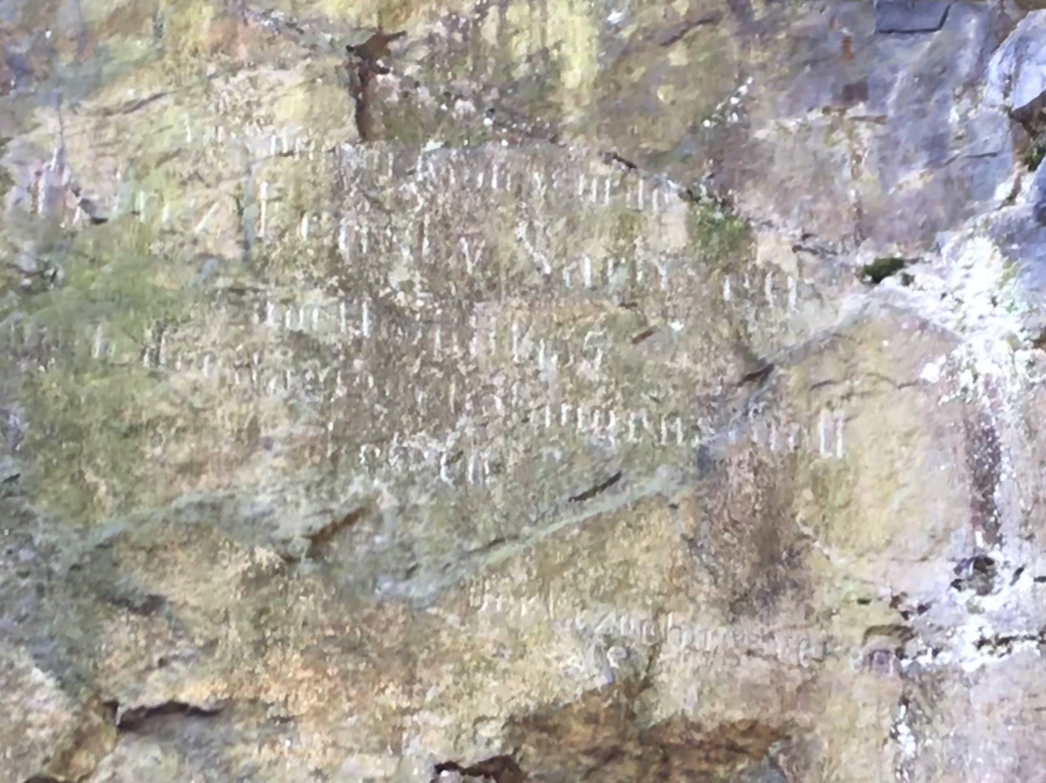 lateinische Inschrift Prinzenhöhle